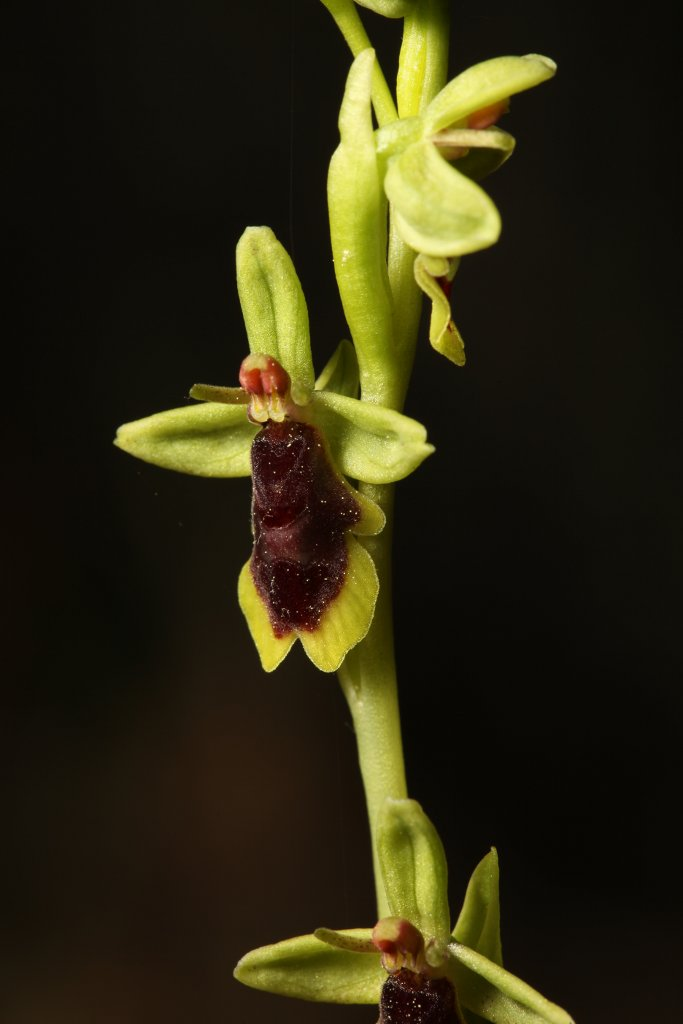 Ophrys subinsectifera Aragón